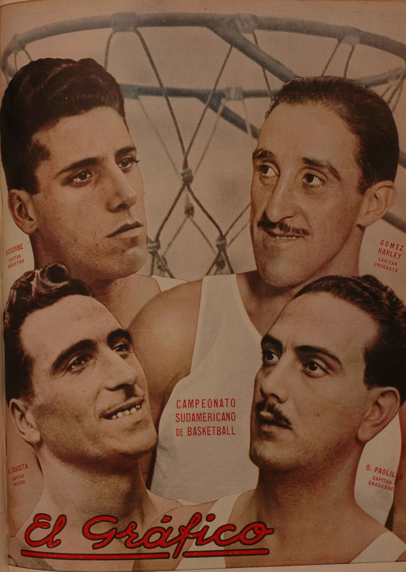 El Grafico del 21 de Abril de 1934. Edicion 771